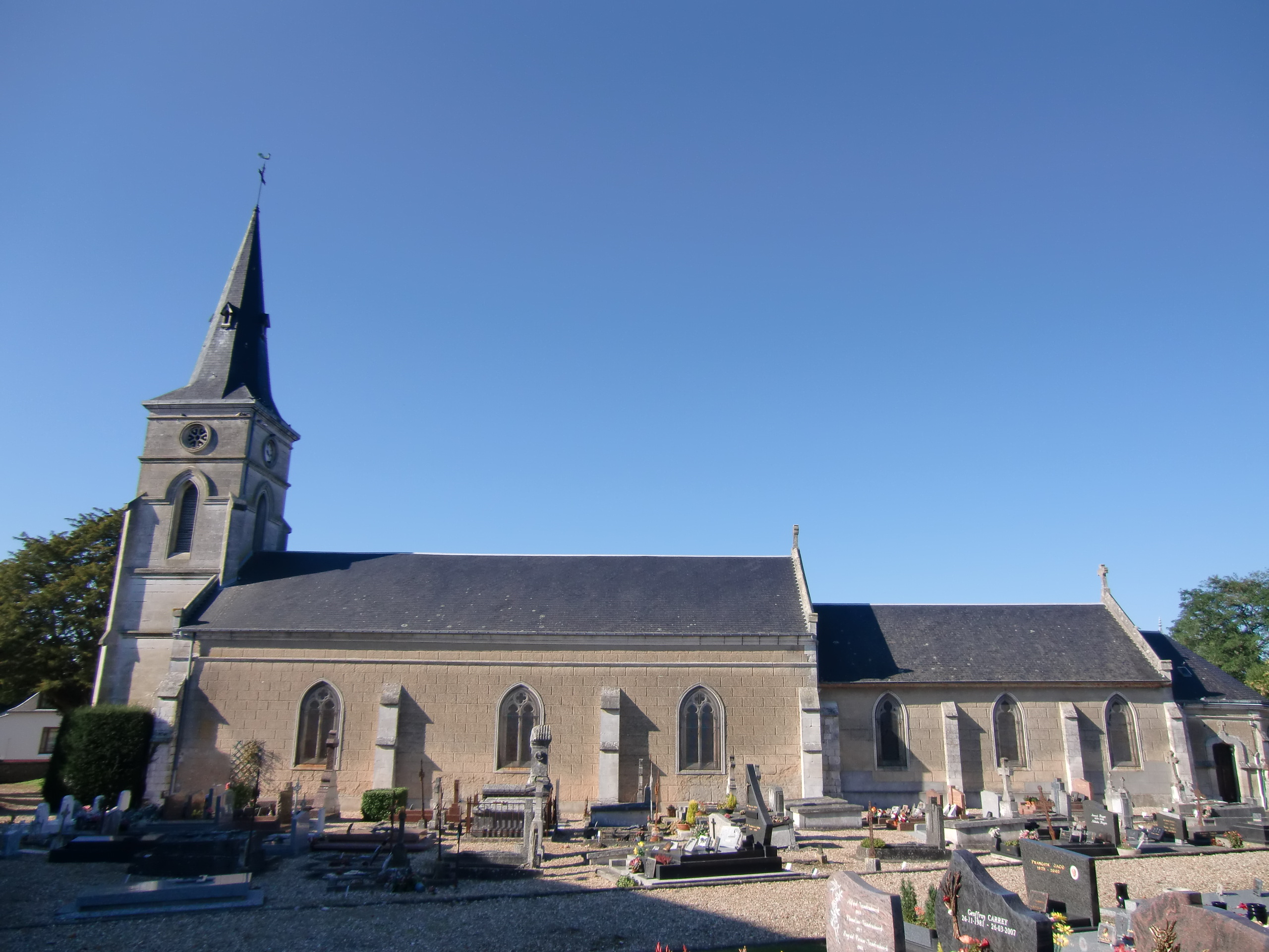 église paroissiale de Sainte-Opportune-la-Mare (Eure, Normandie, France)